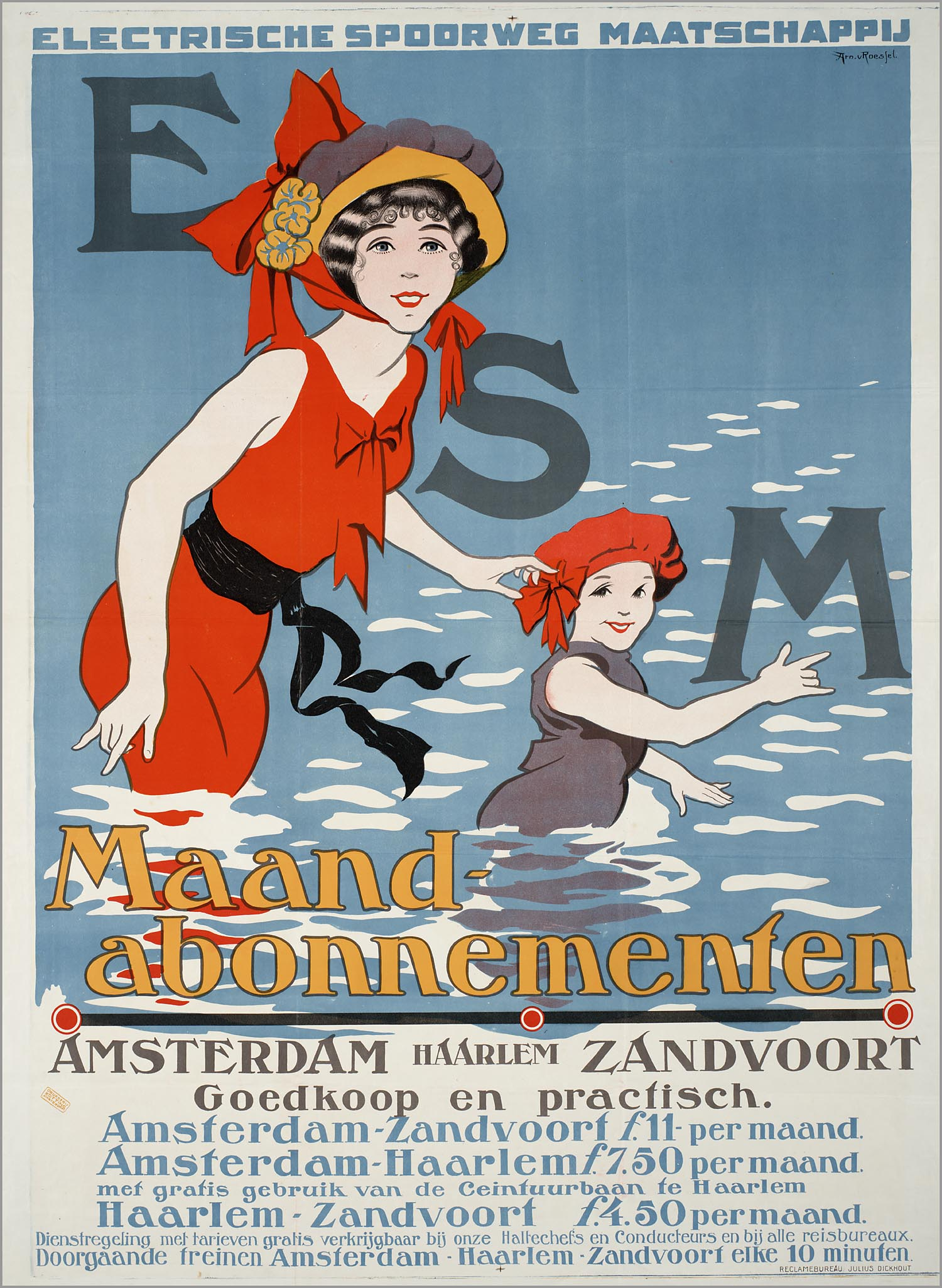 ESM Maandabonnementen Maker opdrachtgever/adverteerder: Electrische Spoorweg Maatschappij, Reclamebureau Julius Dickhout (Amsterdam) ontwerper/artdirector: Roessel, Arnold van drukker: Drukkerij Kotting